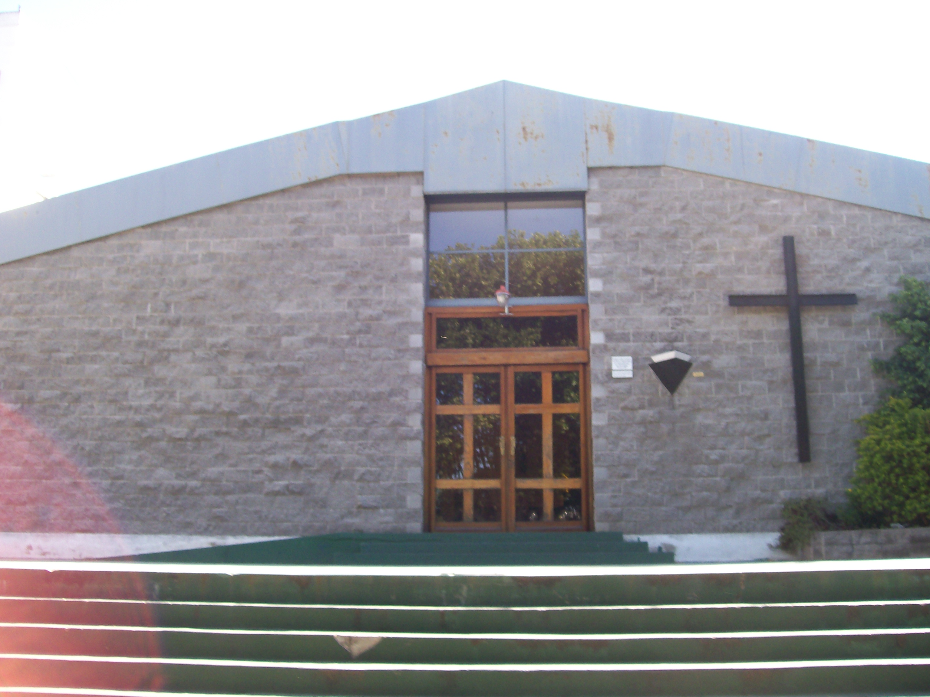 Catedral de San Martín, plaza central, Gral San Martín, Buenos Aires.